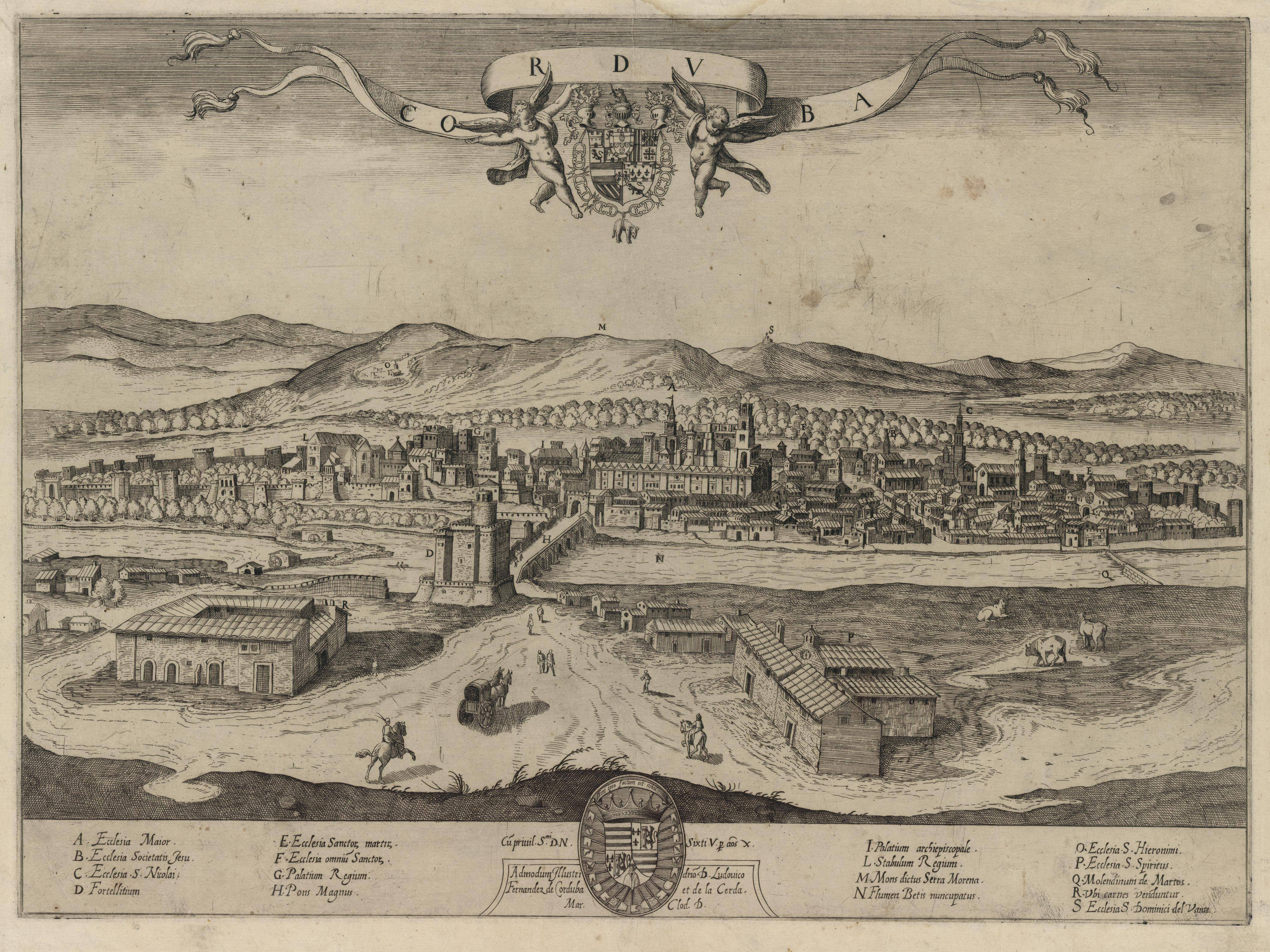 Grabado de la ciudad de Córdoba (España) publicado entre 1585-1590 por un anónimo italiano. Leyenda: A: Ecclesia Maior (Mezquita-Catedral) B: Ecclesia Societatis Jesu C: Ecclesia S. Nicolai D: Fortellitium (Torre de la Calahorra) E: Ecclesia Sanctor martir F: Ecclesia omniu Sactor G: Palatium Regium (Alcázar de los Reyes Cristianos) H: Pons Magnus (Puente romano) I: Palatium archiepiscopale (Palacio Episcopal) L: Stabulum Regium (Caballerizas Reales) M: Mons dictus Serra Morena (Sierra Morena) N: Flumen Betis nuncupatus (Río Guadalquivir) O: Ecclesia S. Hieronimi P: Ecclesia S. Spiritus Q: Molendinum de Martos (Molino de Martos) R: Ubi carnes venduntur S: Ecclesia S. Dominici del Vante .